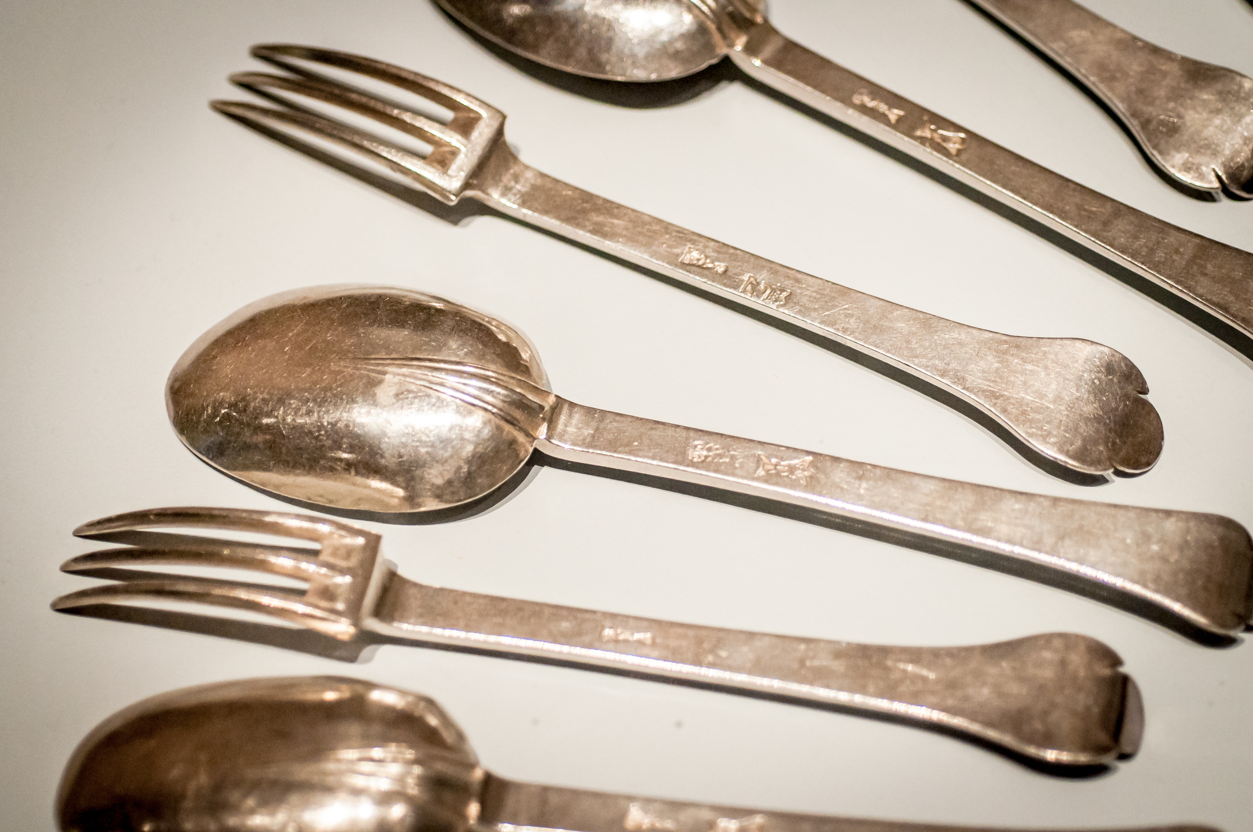 Service de cuillères et fourchettes en argent caché lors de la Révolution Française et découvert au début du XXe siècle. Orfèvrerie de Claude Guillot (1661-1663) et d'un orfèvre non identifié (1668-1669)